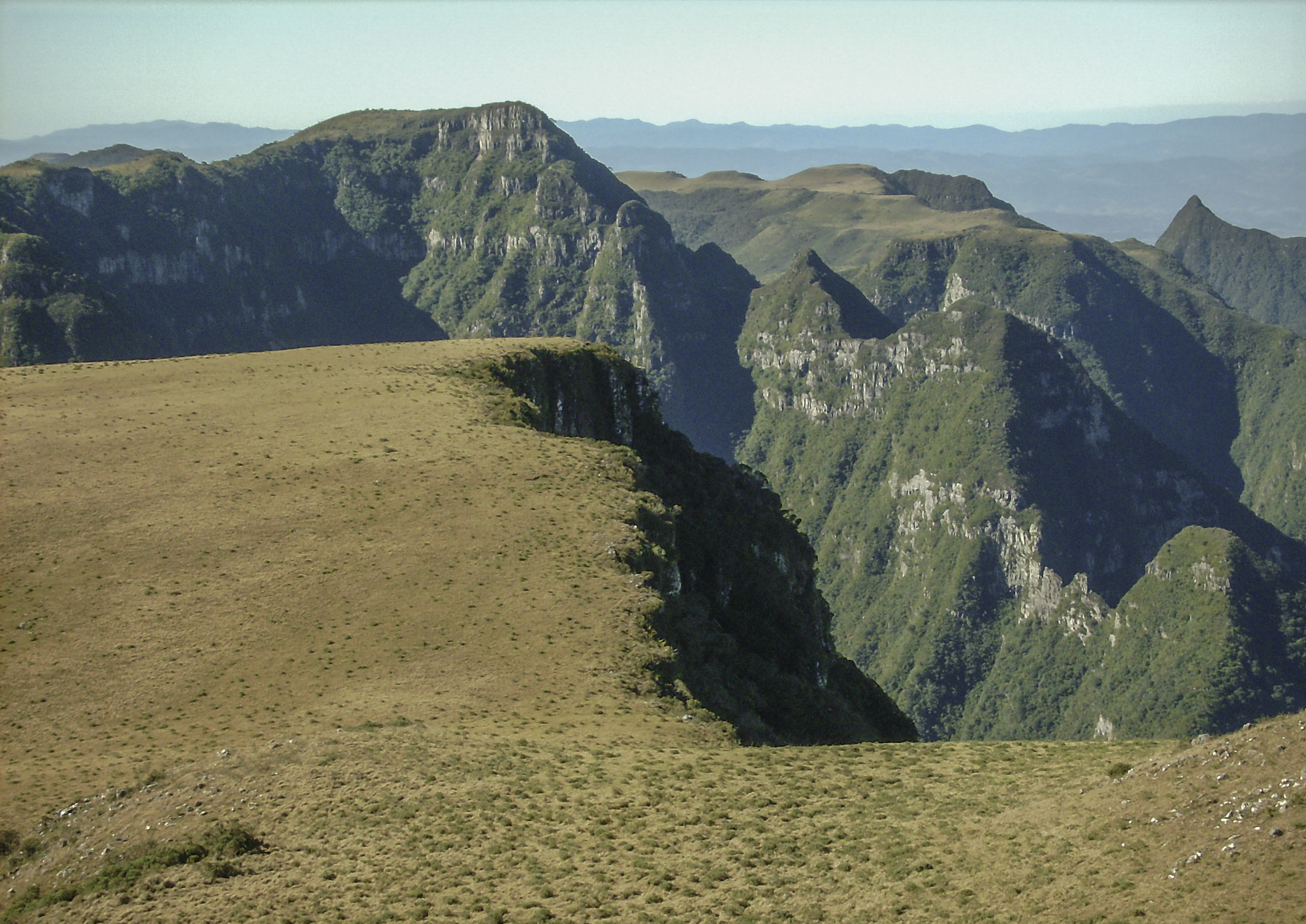 Borda da Serra geral no Parque Nacional de São Joaquim.